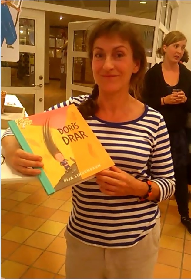 Pija Lindenbaum, författare, med senaste boken "Doris drar". 23 sep 2015, Kulturhuset Fregatten, Stenungsund